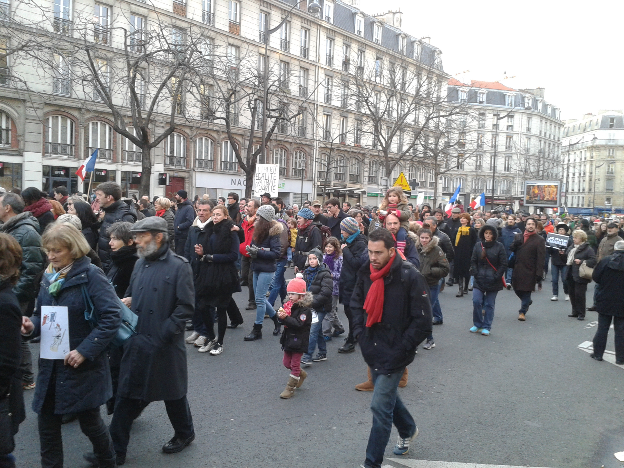 Arrivée de la marche dans le quartier place de la Nation, à Paris